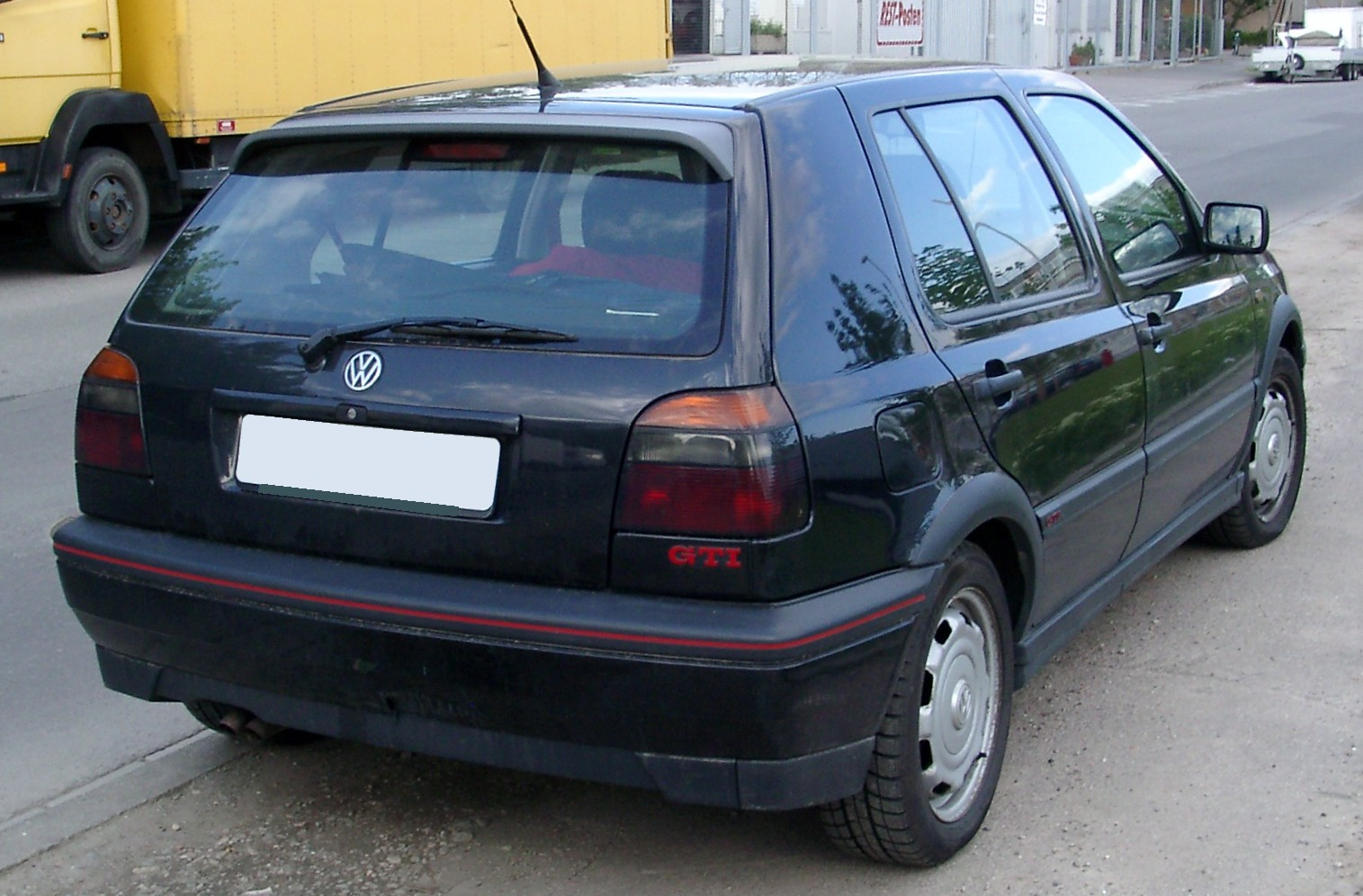 VW Golf III GTI